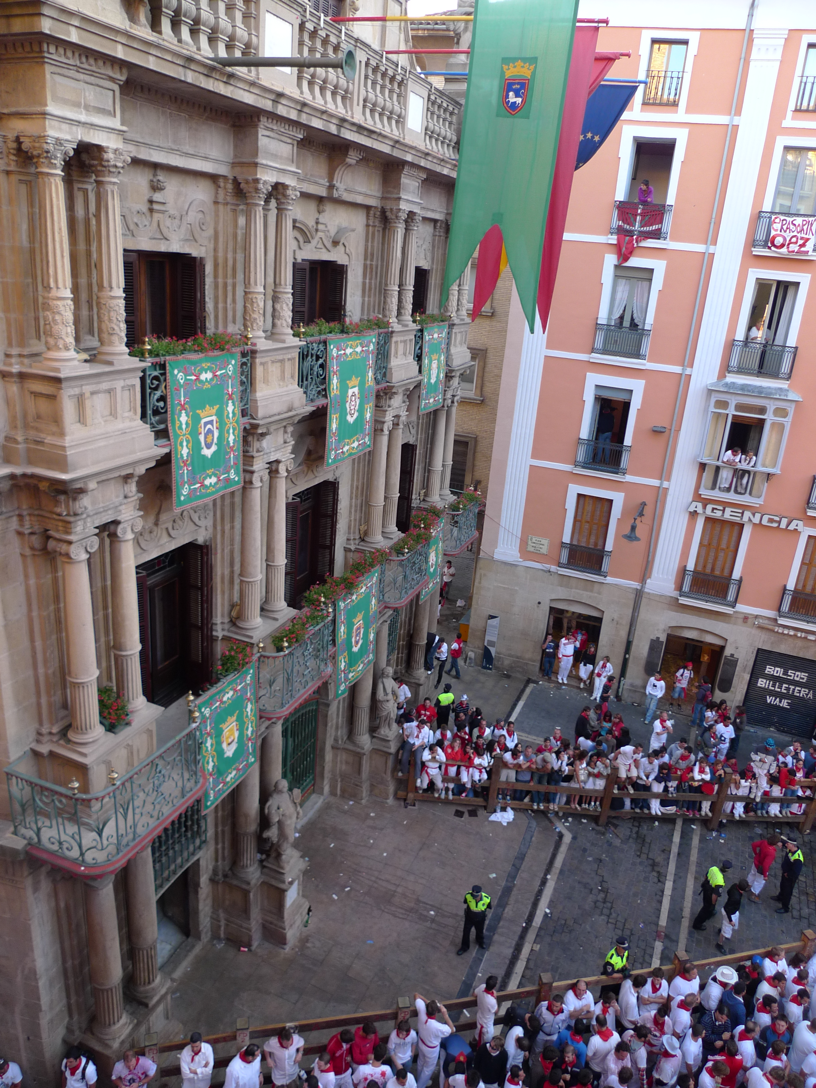 sanfermin 2009, pamplona, spain